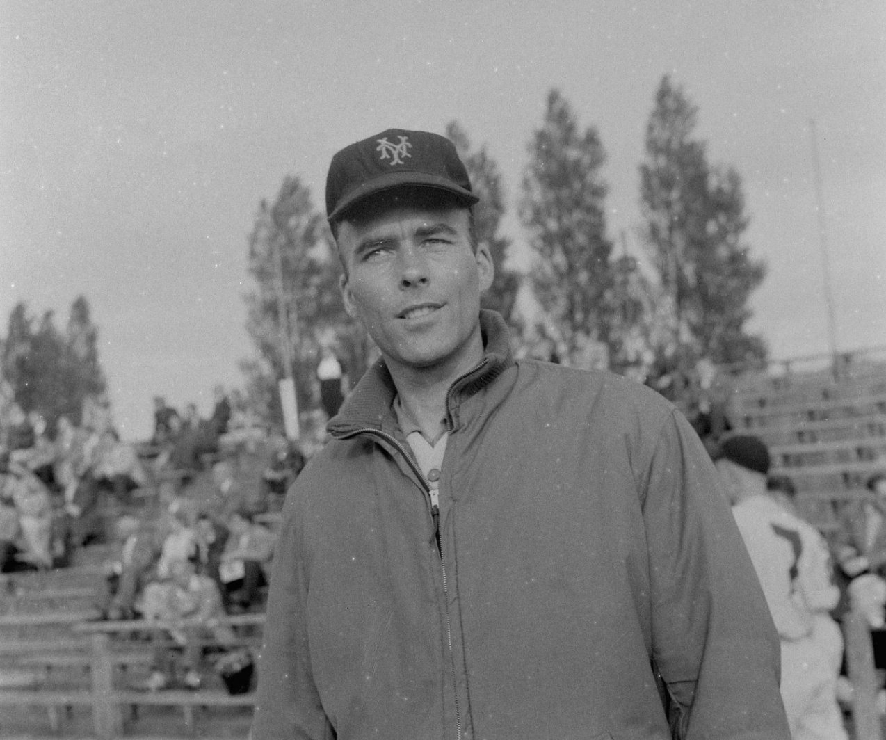 Jan Smidt